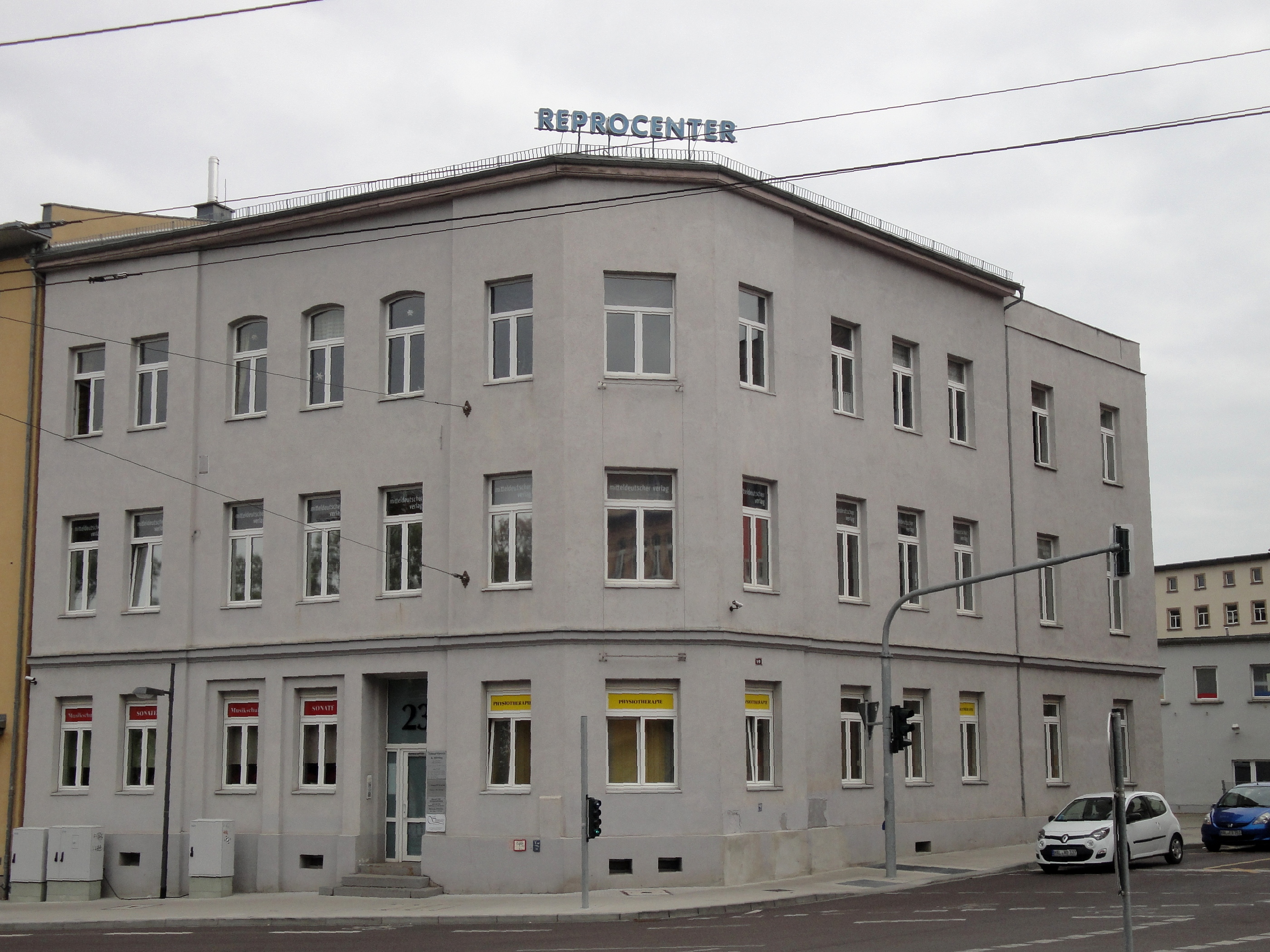 Mitteldeutscher Verlag, Reprocenter, Halle (Saale)